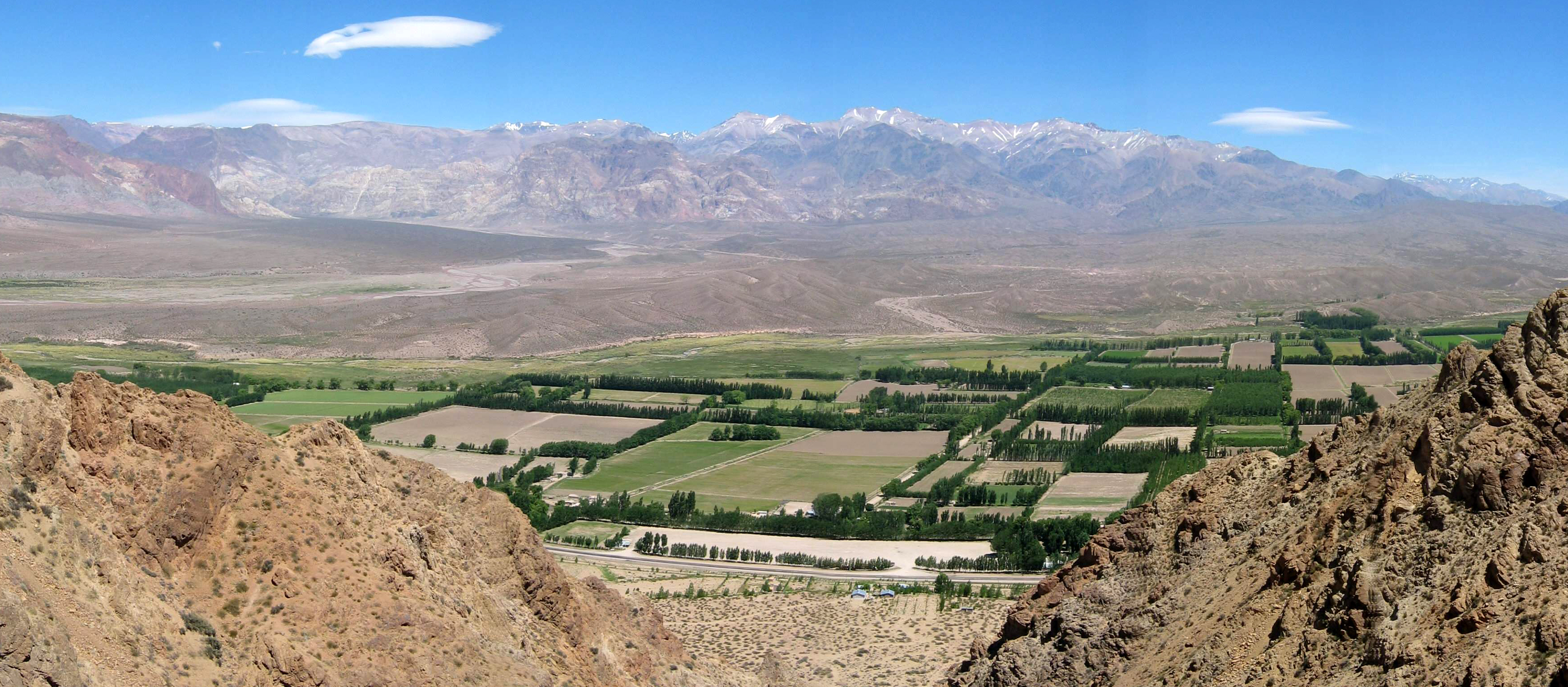 Panorámica de Paramillos de Uspallata